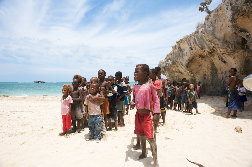 Andavadoaka